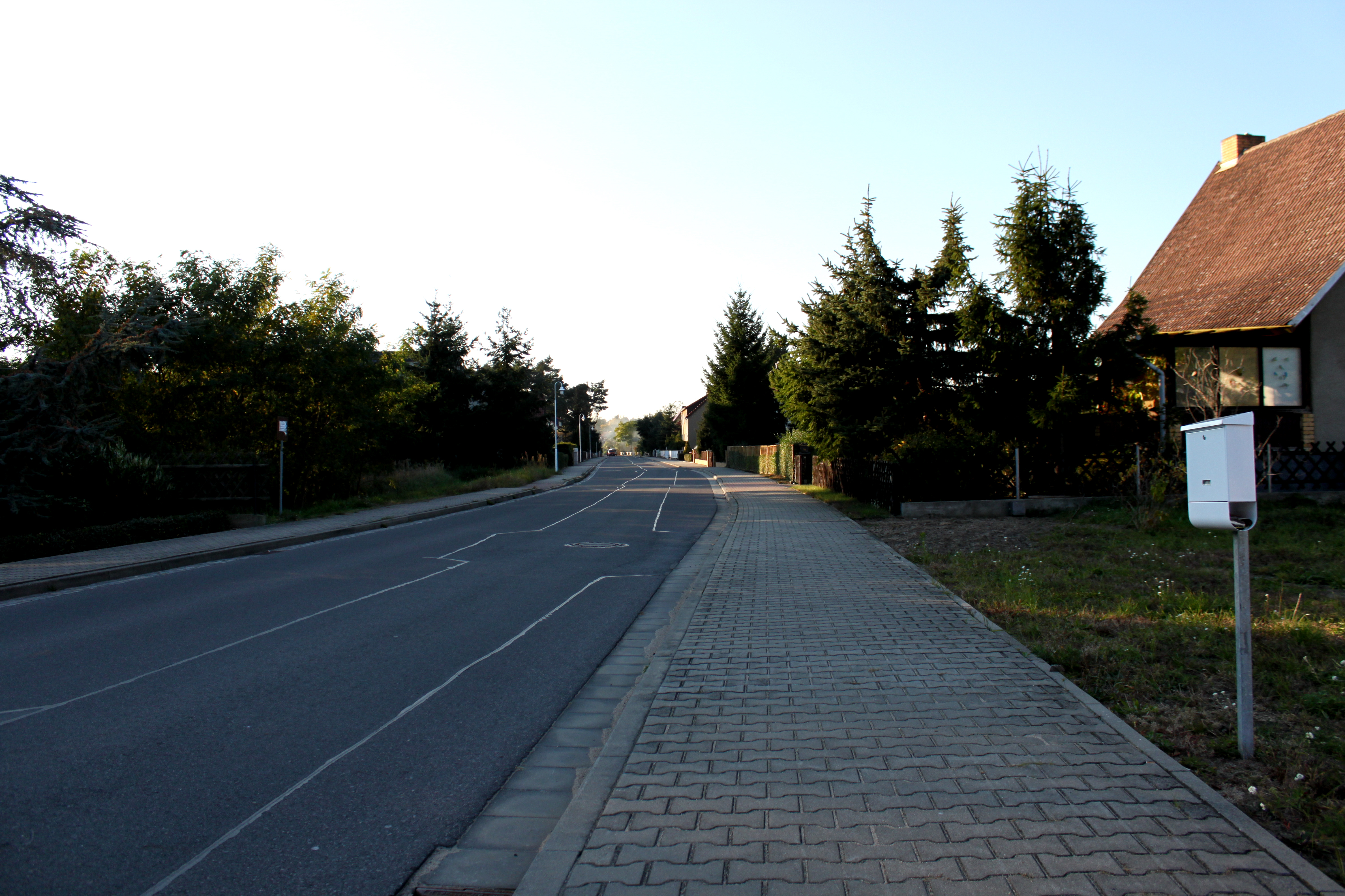 Haida